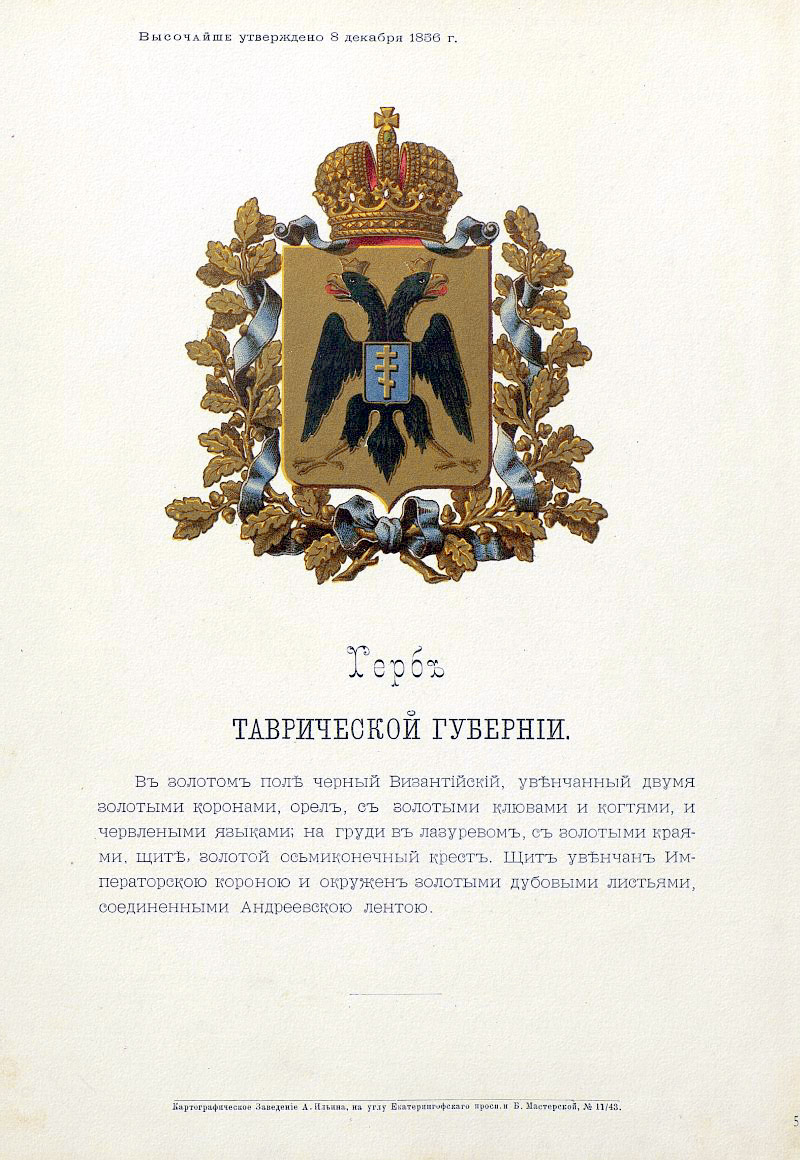 Official Russian Empire coat of arms Tavria Governorate. Герб Российской Империи Таврической губернии с официальным описанием в Гербовнике Бенке. Утверждён Императором Всероссийским Александром Вторым.